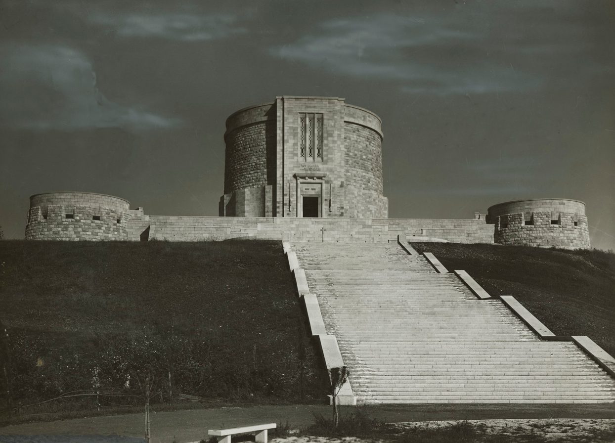 sacrario di Oslavia